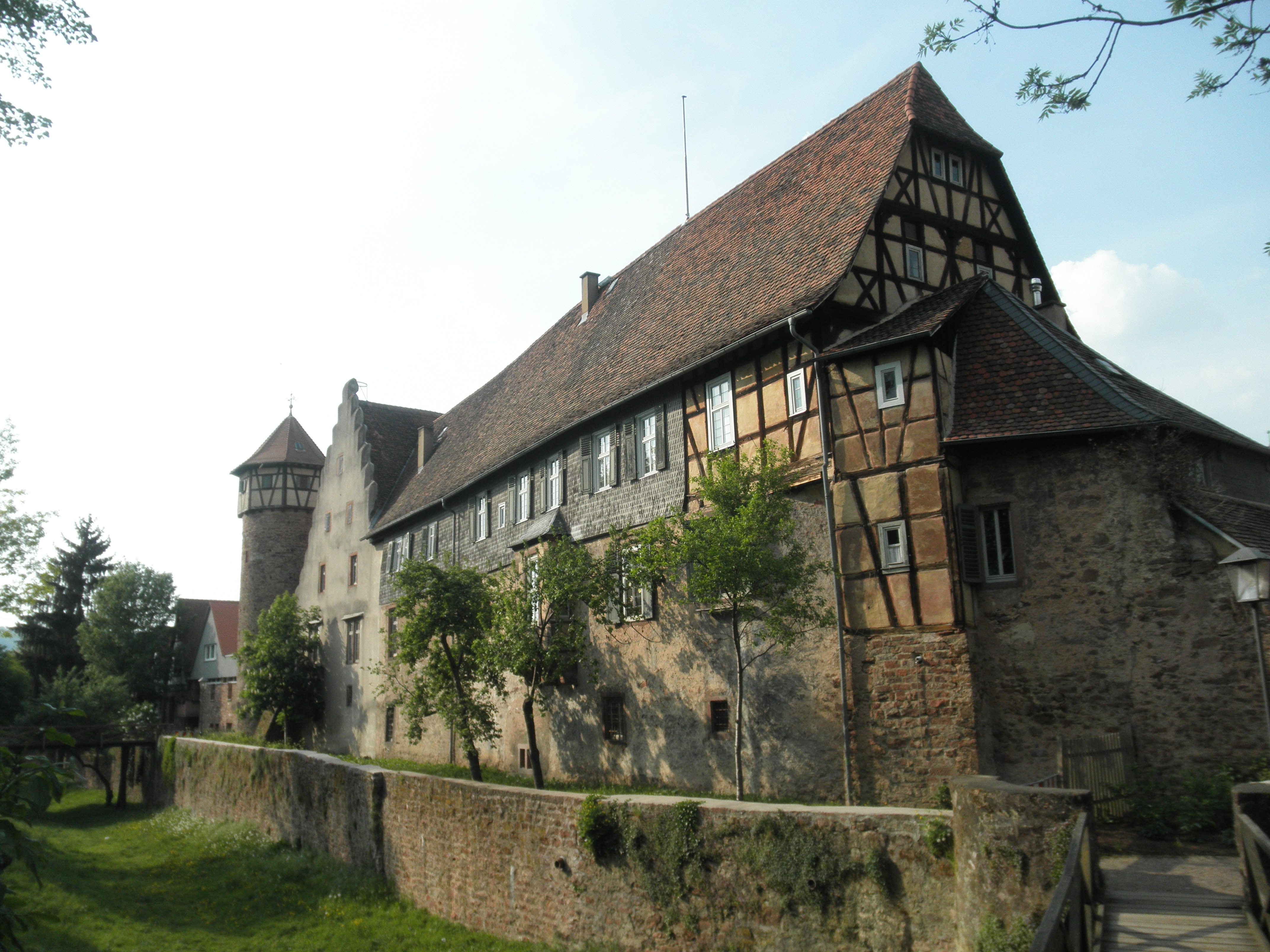 la historia urba burgo Kellerei Michelstadt